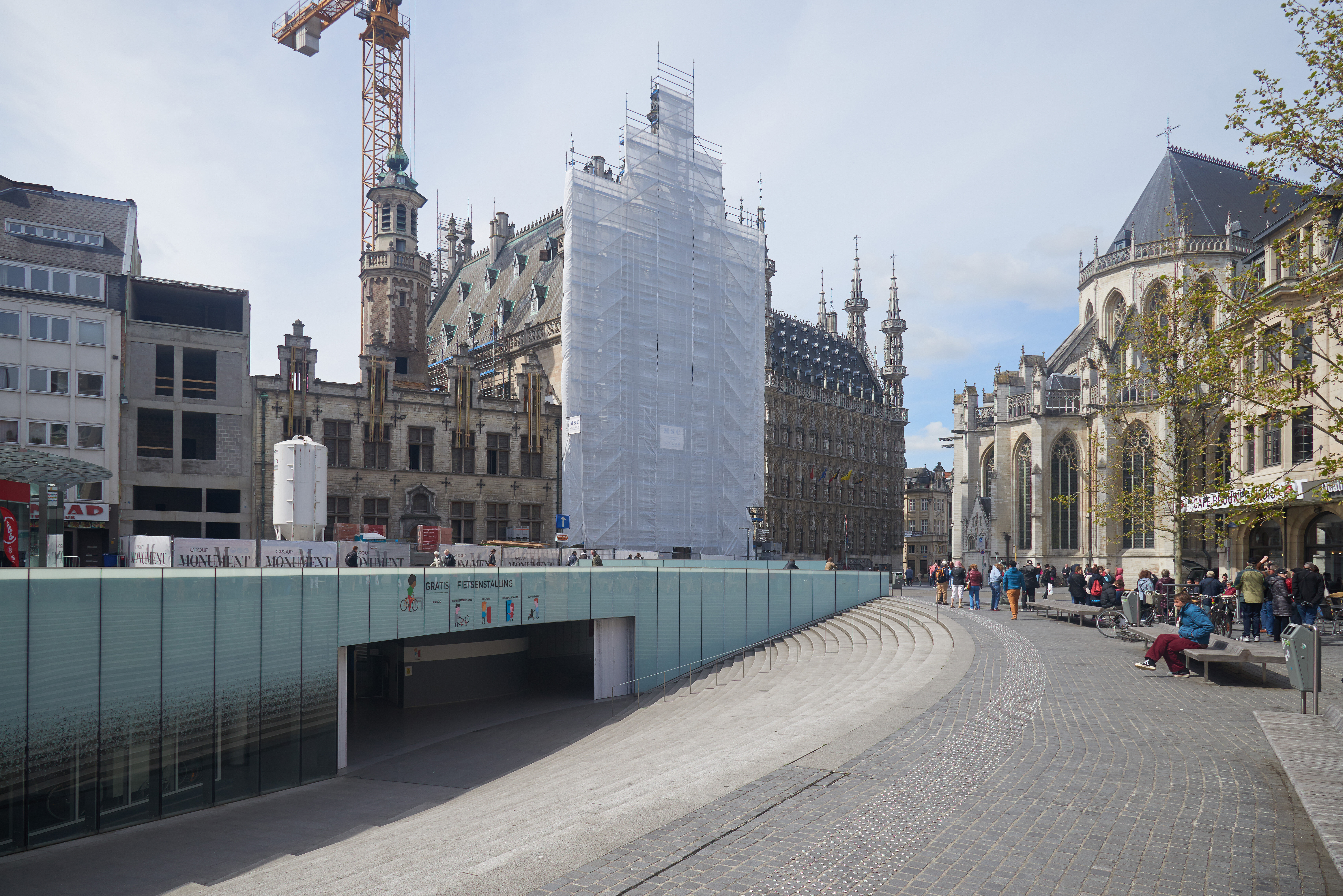 Rector De Somerplein met fietsenstalling, Leuven